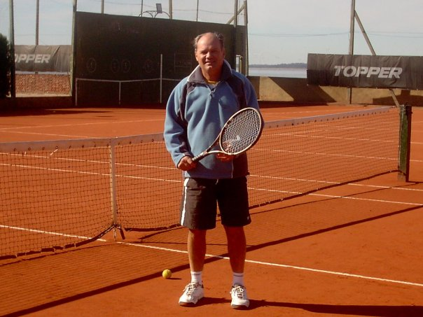 Fernando Dalla Fontana en el Santa Fe Lawn Tenis, Santa Fe, Argentina.